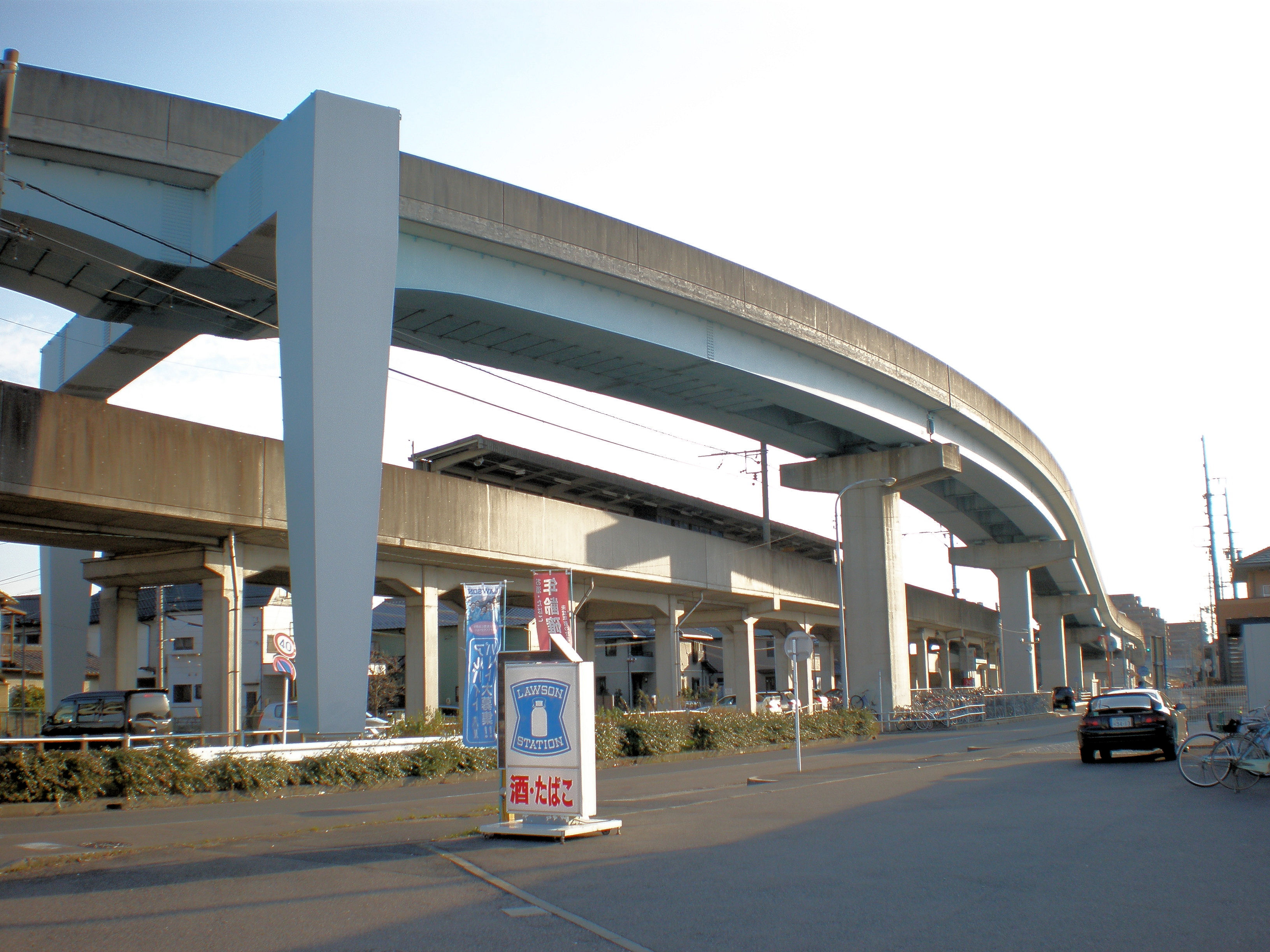 愛知県小牧市にある名鉄小牧原駅